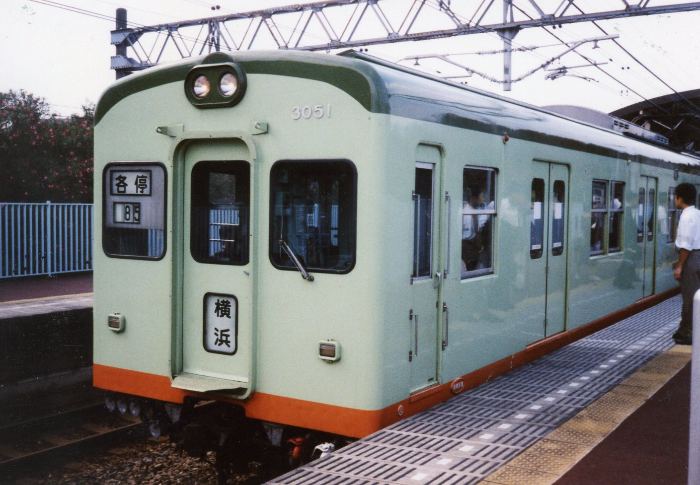 相模鉄道2代目3000系(1987 - 1998)